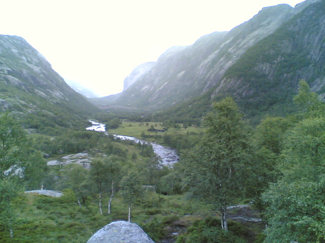 Fidjadalen, Mån i Gjesdal